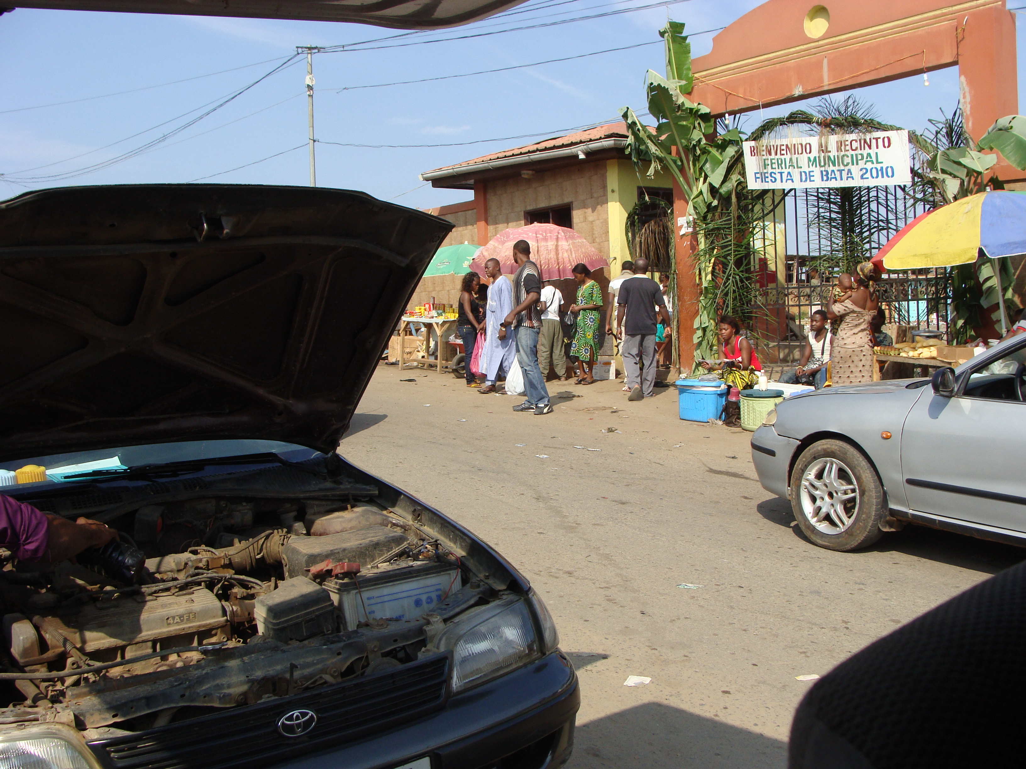 Straßenverkauf in Bata